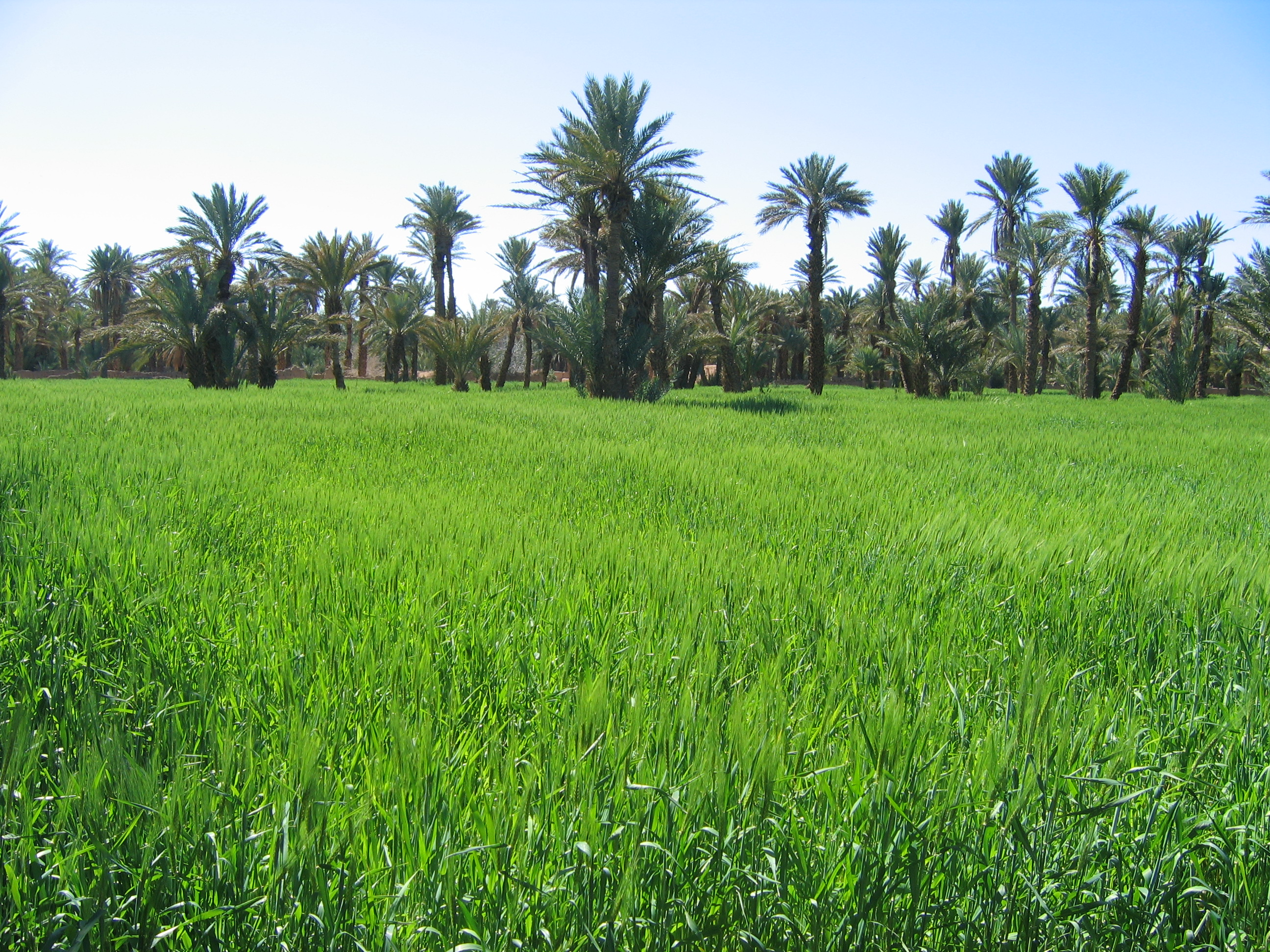 Culture de céréales dans une oasis